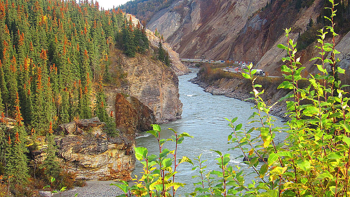 McKinley Park, AK, USA